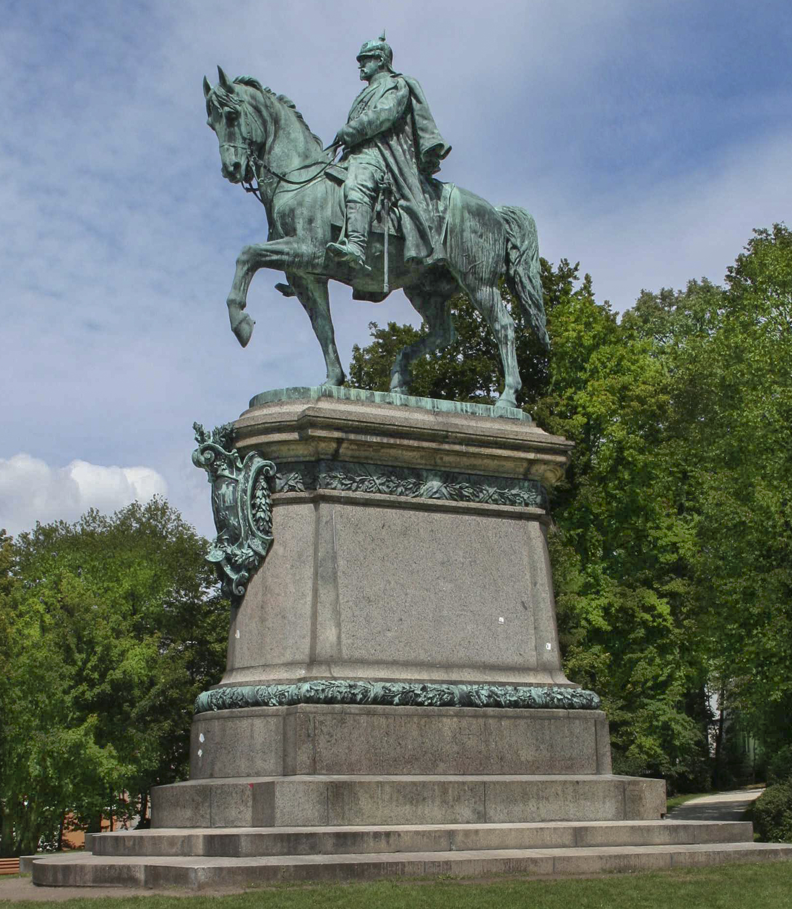 Reiterdenkmal Herzog Ernsts II. im Coburger Hofgarten. Bildhauer: Gustav Eberlein